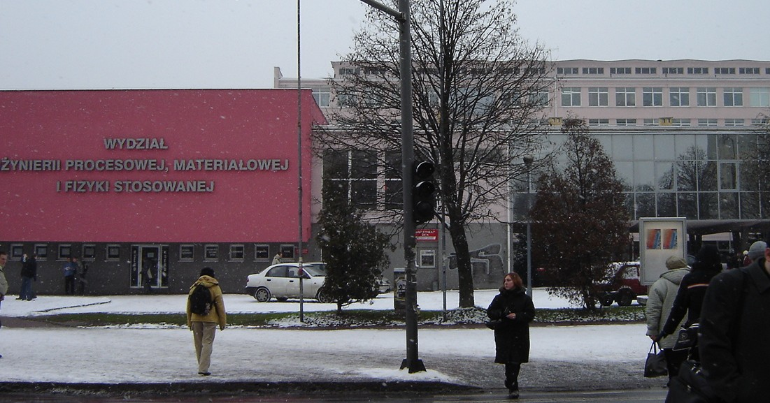 Wydział Inżynierii Procesowej, Materiałowej i Fizyki Stosowanej Politechniki Częstochowskiej. Autor zdjęcia: Reytan